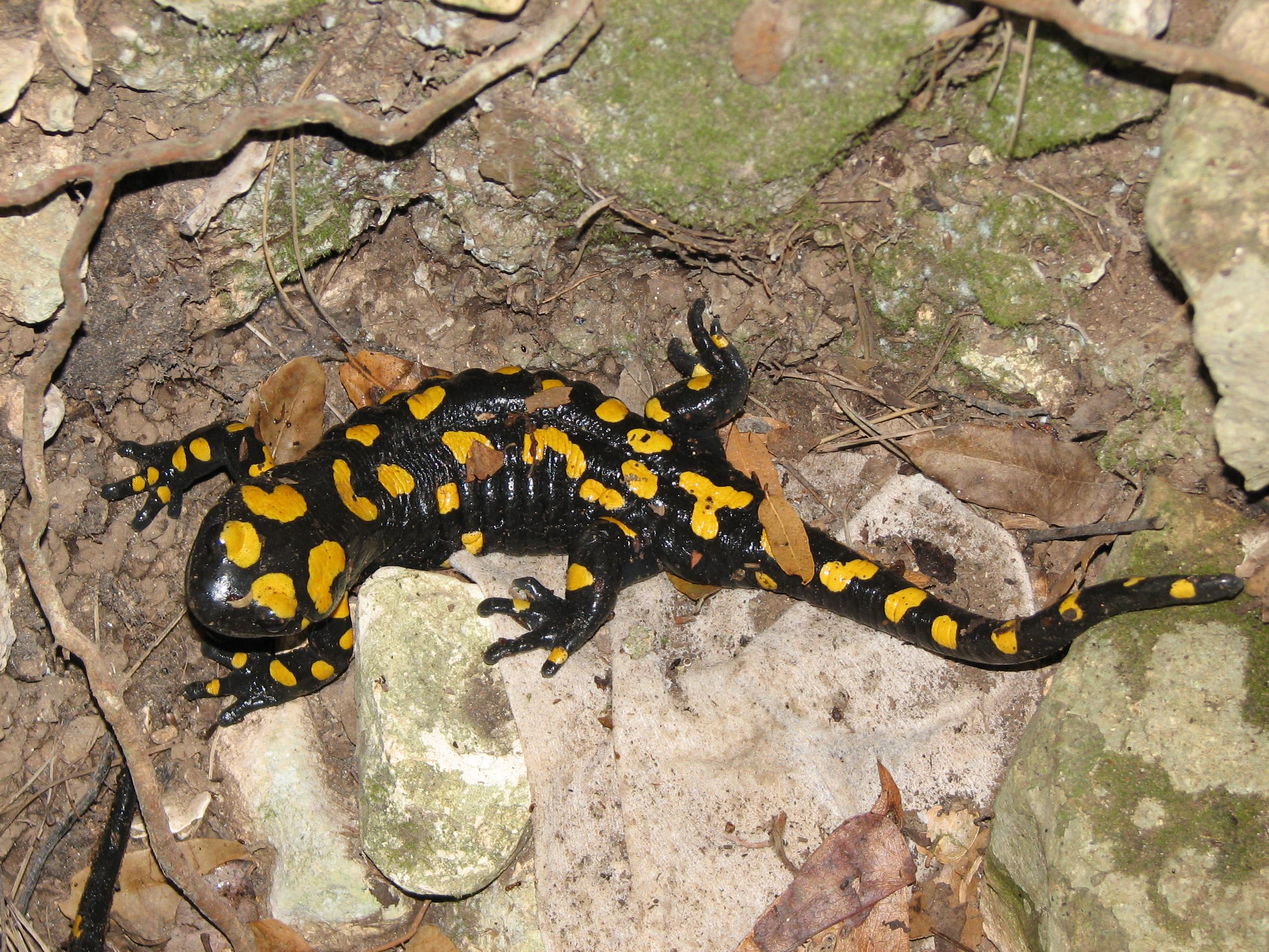 Fire Salamander